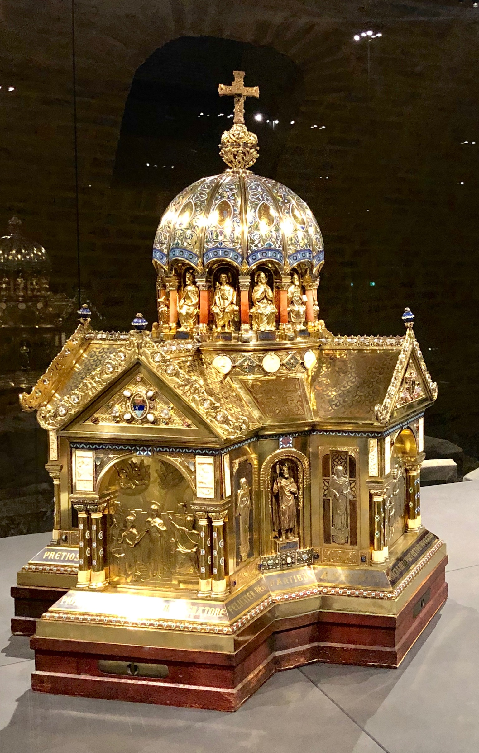 Historistischer Corona-Lepardus-Schrein in Aachener Domschatzkammer